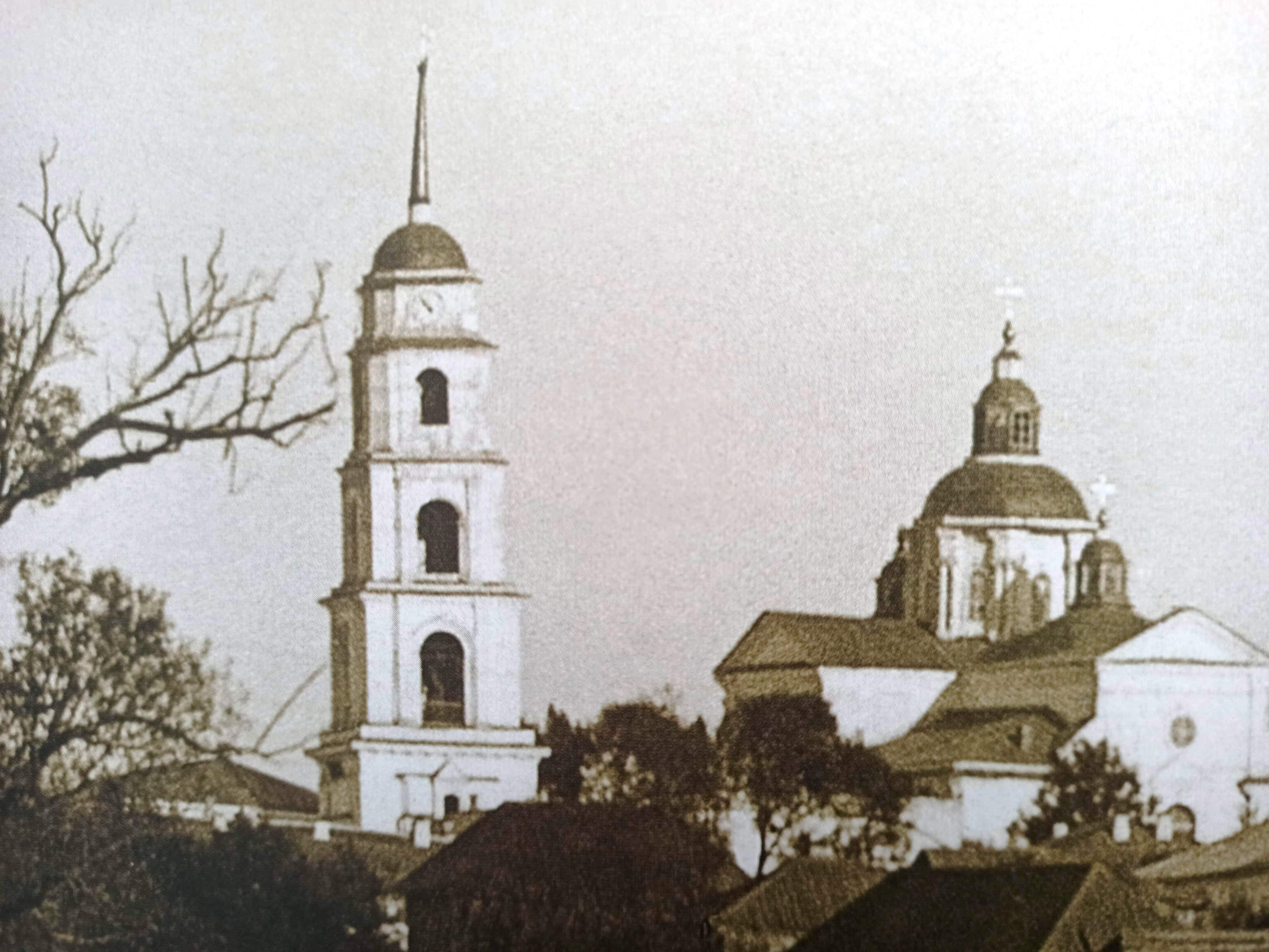 Дзвіниця Троїцького собору (західний фасад)